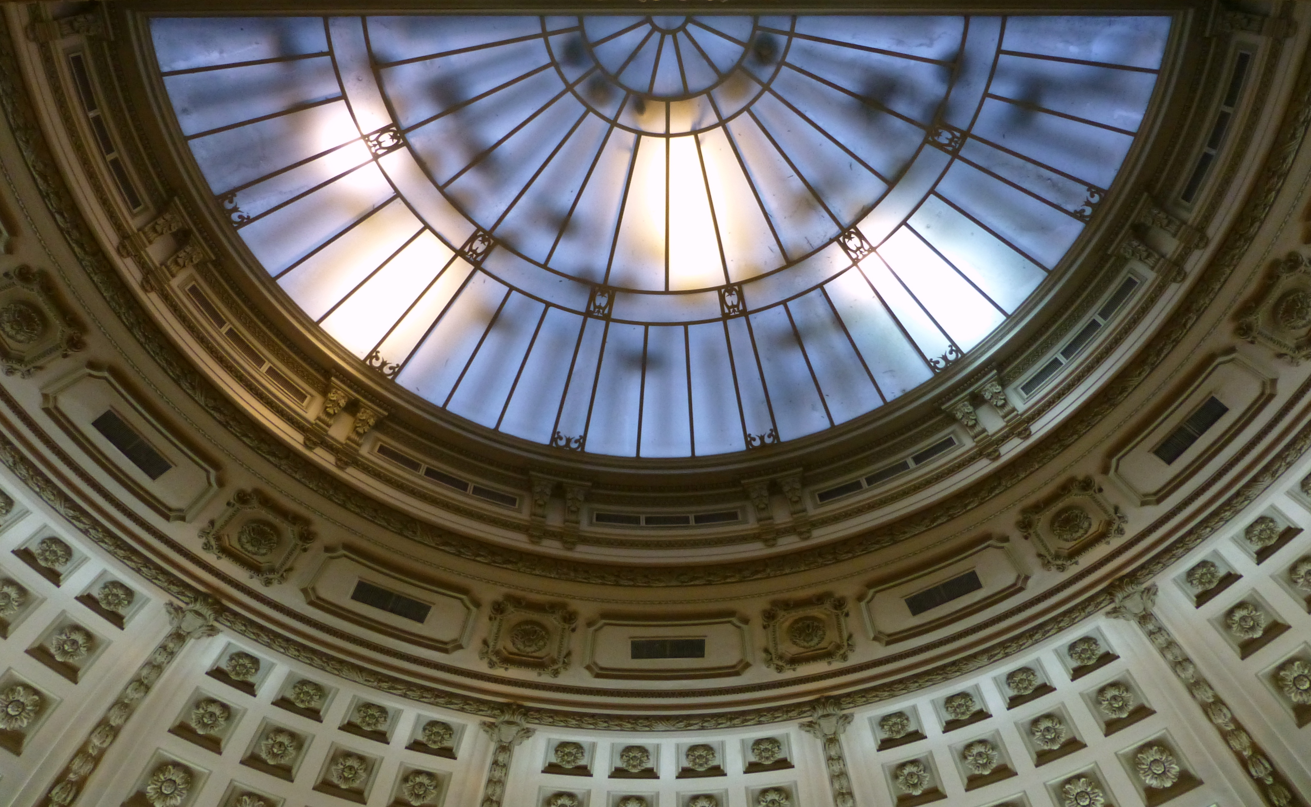 Cúpula del Recinto de Sesiones de la Legislatura Porteña.